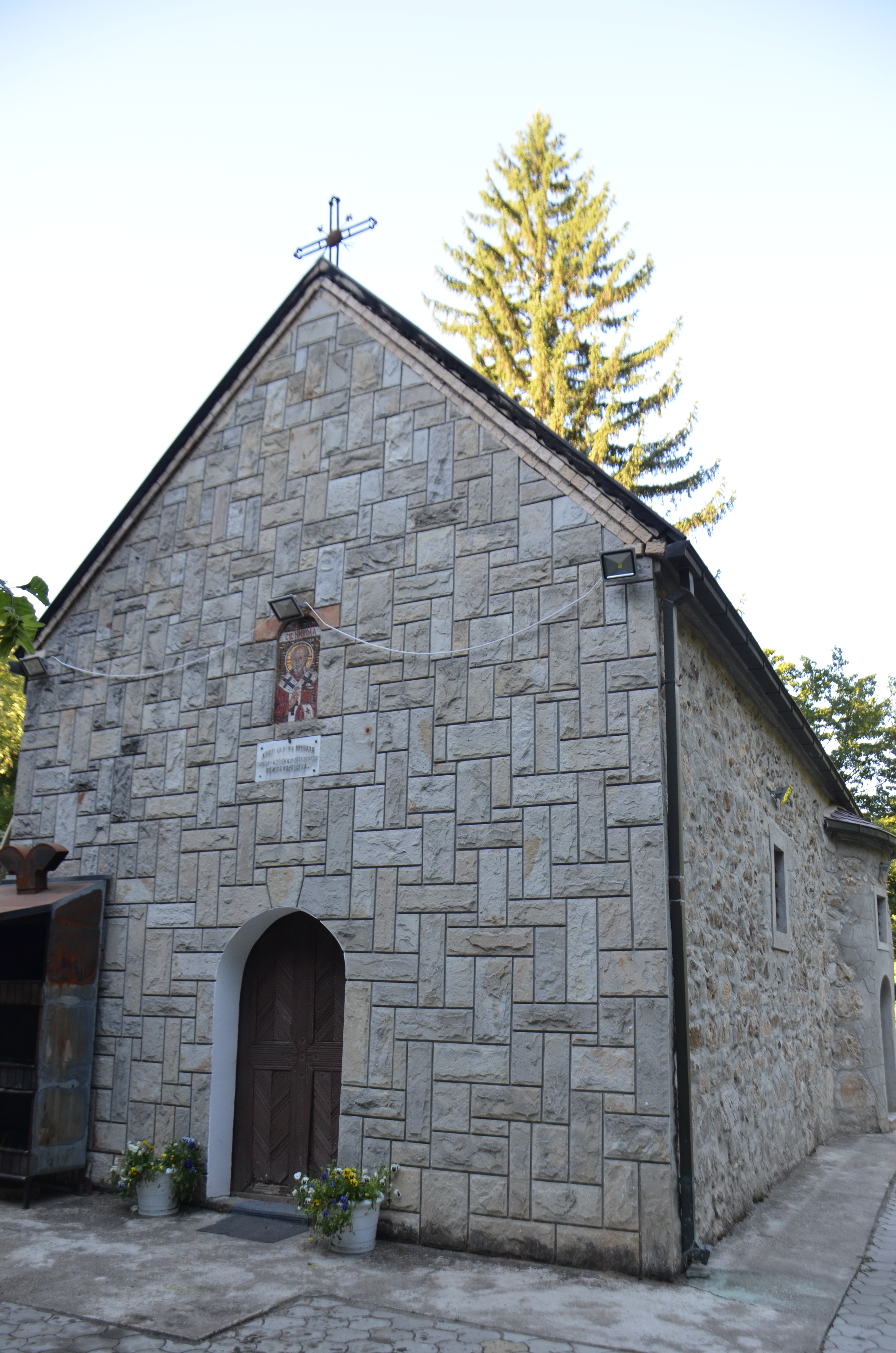 Манастир Својново, општина Параћин, Поморавски округ